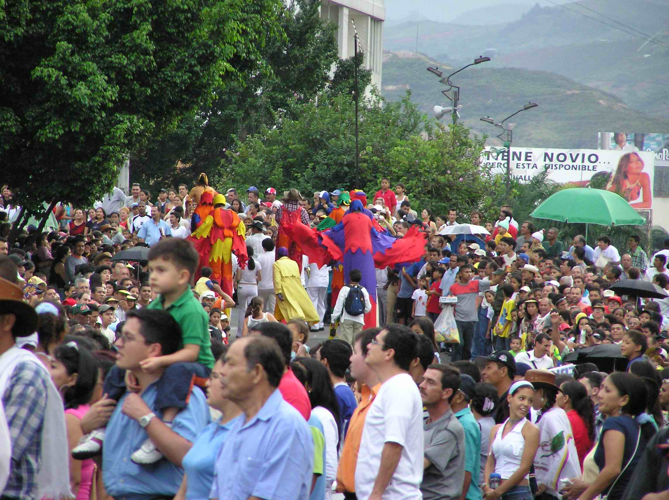 Un muestreo aleatorio gente de cali